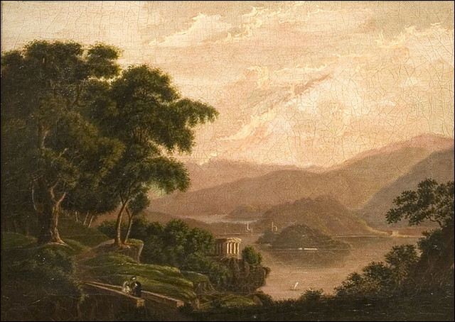 Oil on linen, Isola San Giovanni